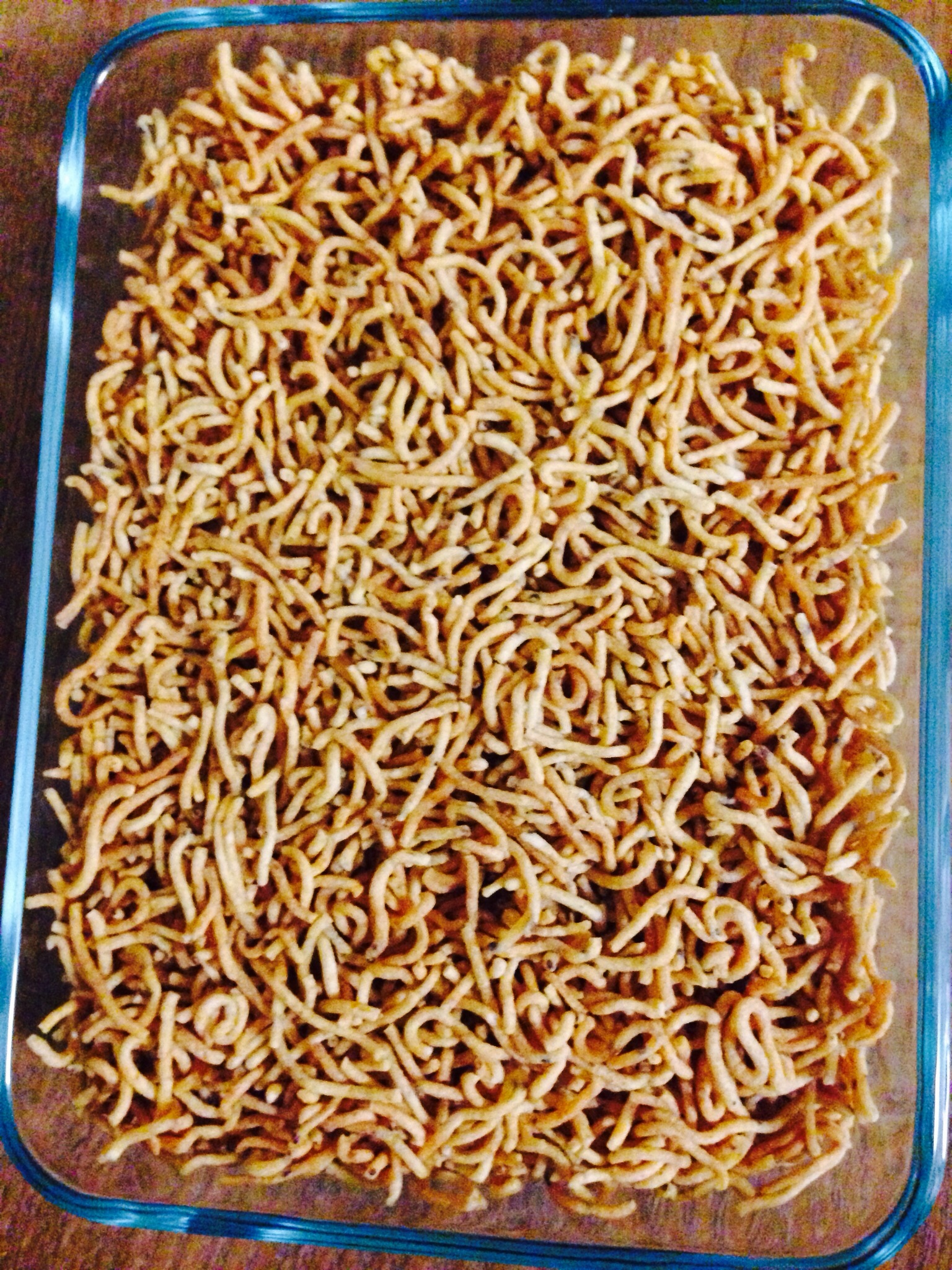 Sev